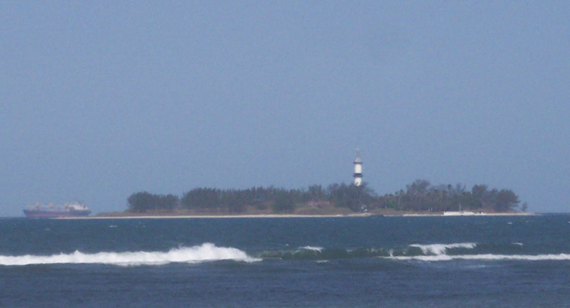 Sacrificios Island, this is the main and biggest island in the coast of Veracruz City. SPANISH: Isla de Sacrificios, esta es la isla principal y más grande de la costa de la ciudad de Veracruz. Port and City of Veracruz. Estate of Veracruz, Mexico. SPANISH: Ciudad y Puerto de Veracruz, Estado de Veracruz, México.